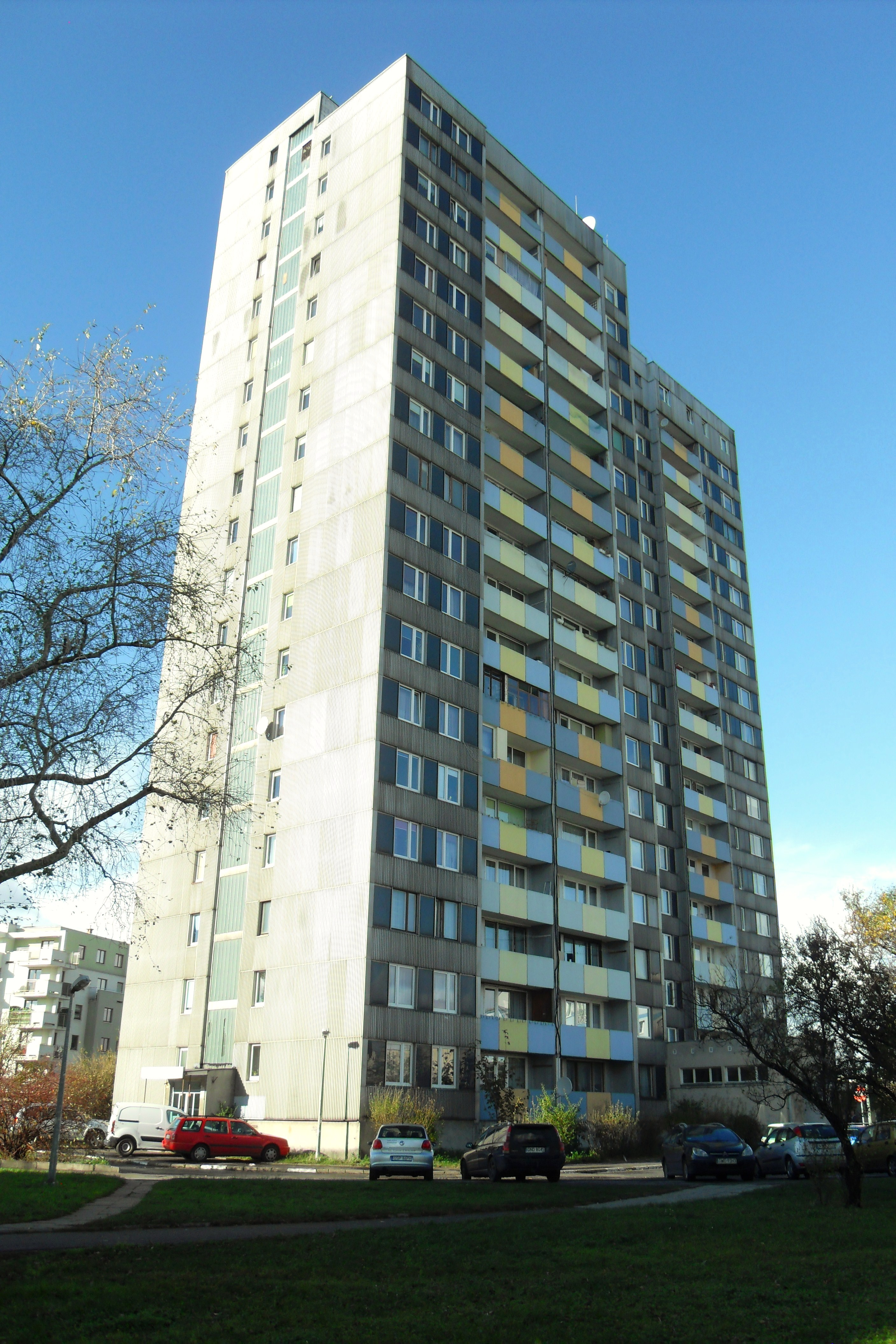 Gdańsk Przymorze Małe, wieżowiec ul. Lęborska 21.